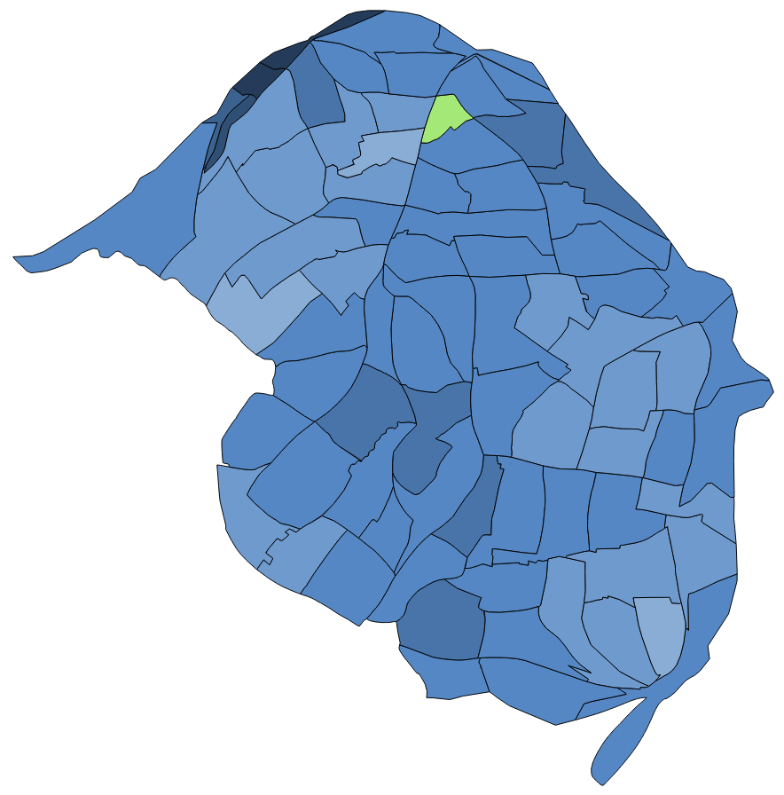 中文（台灣）: 顏色對照表